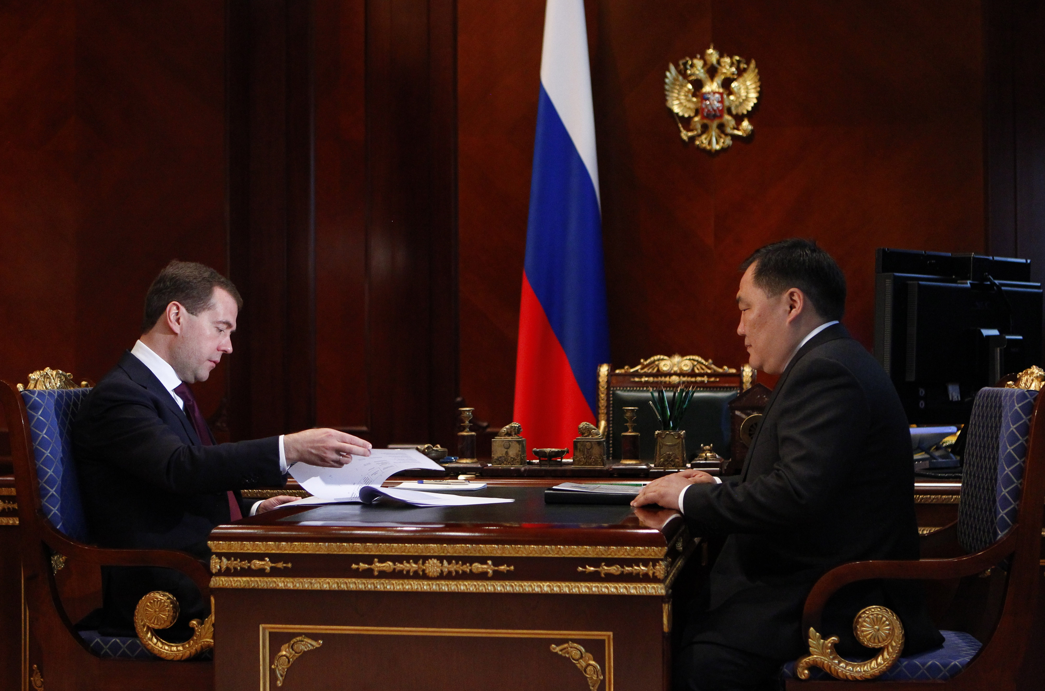 Дмитрий Медведев c Шолбаном Кара-оолом